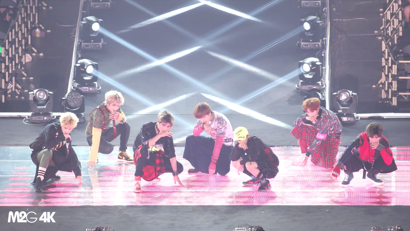 160907 KBS평창동계올림픽기념 KPOP페스티벌 - NCT127 (소방차)